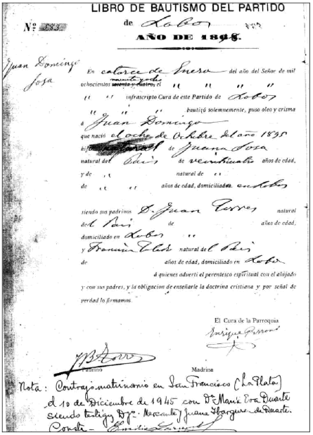 Partida de bautismo de Juan Domingo Perón. 14 de enero de 1898. Nº 583. Parroquia de Nuestra Señora del Carmen. Lobos. Provincia de Buenos Aires. Argentina.